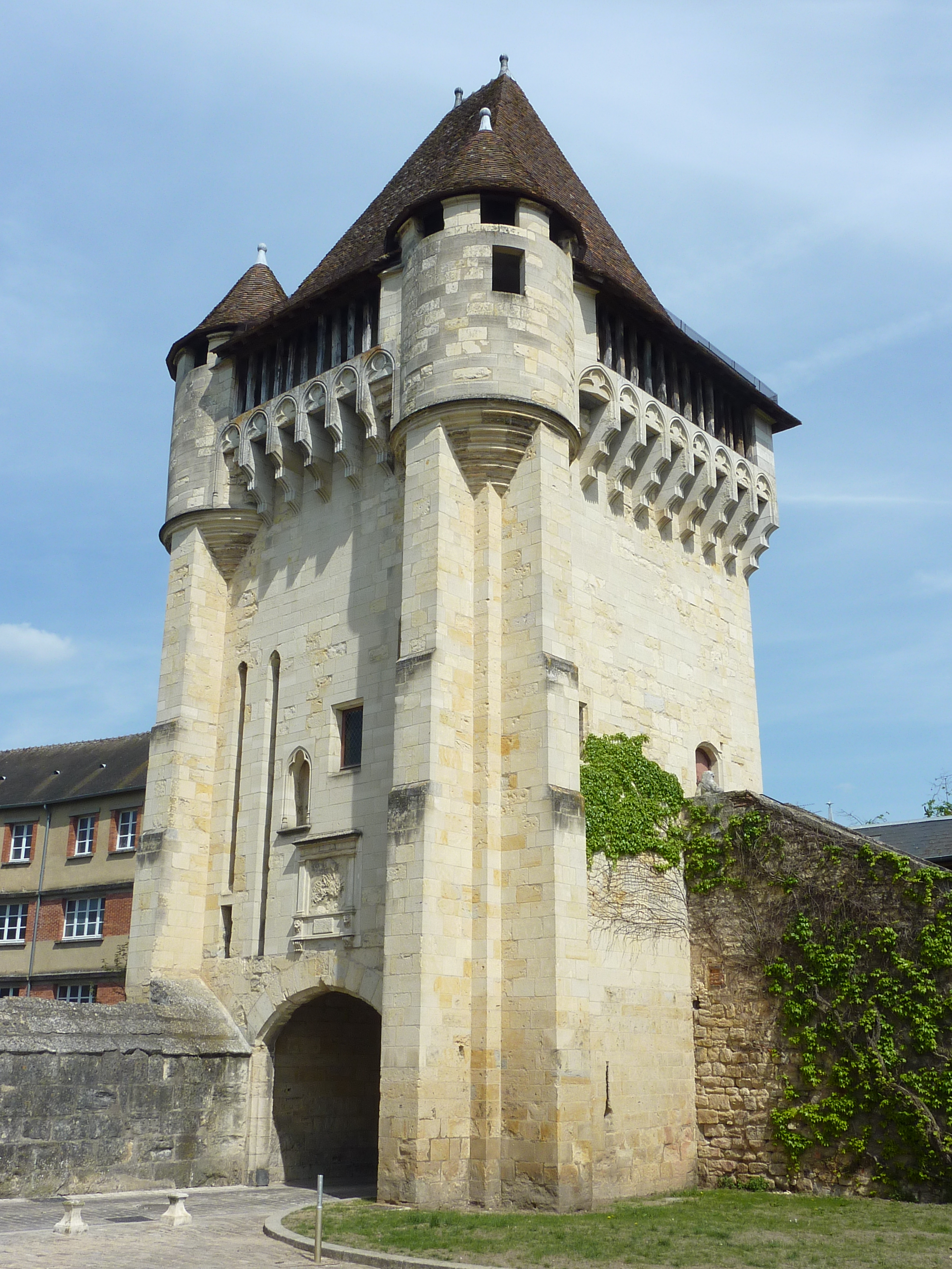 Nevers : la Porte du Croux (1393)